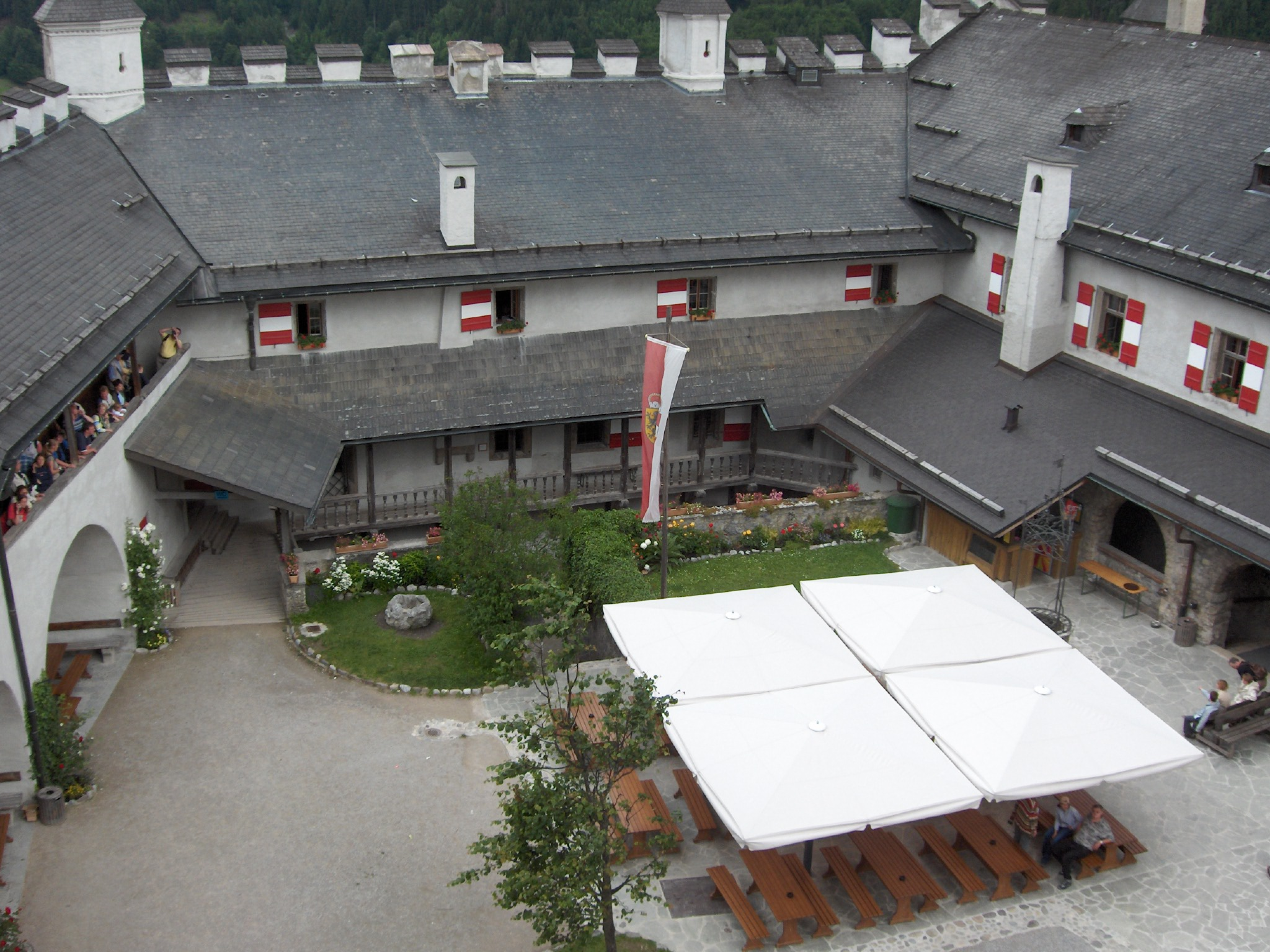 Hohenwerfen gårdsplads. Taget 2004